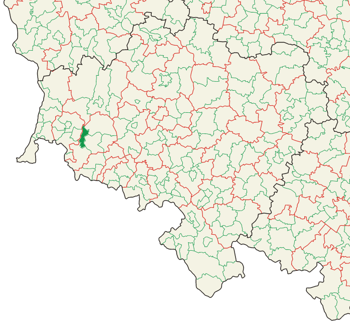 Mapa administracyjna Polski z zaznaczonymi granicami województw (na czarno), powiatów (na czerwono) i gmin (na zielono), południowo zachodni wycinek, województwo dolnośląskie, wycinek z zaznaczeniem gminy Gryfów Śląski. Stan na 1 stycznia 2008